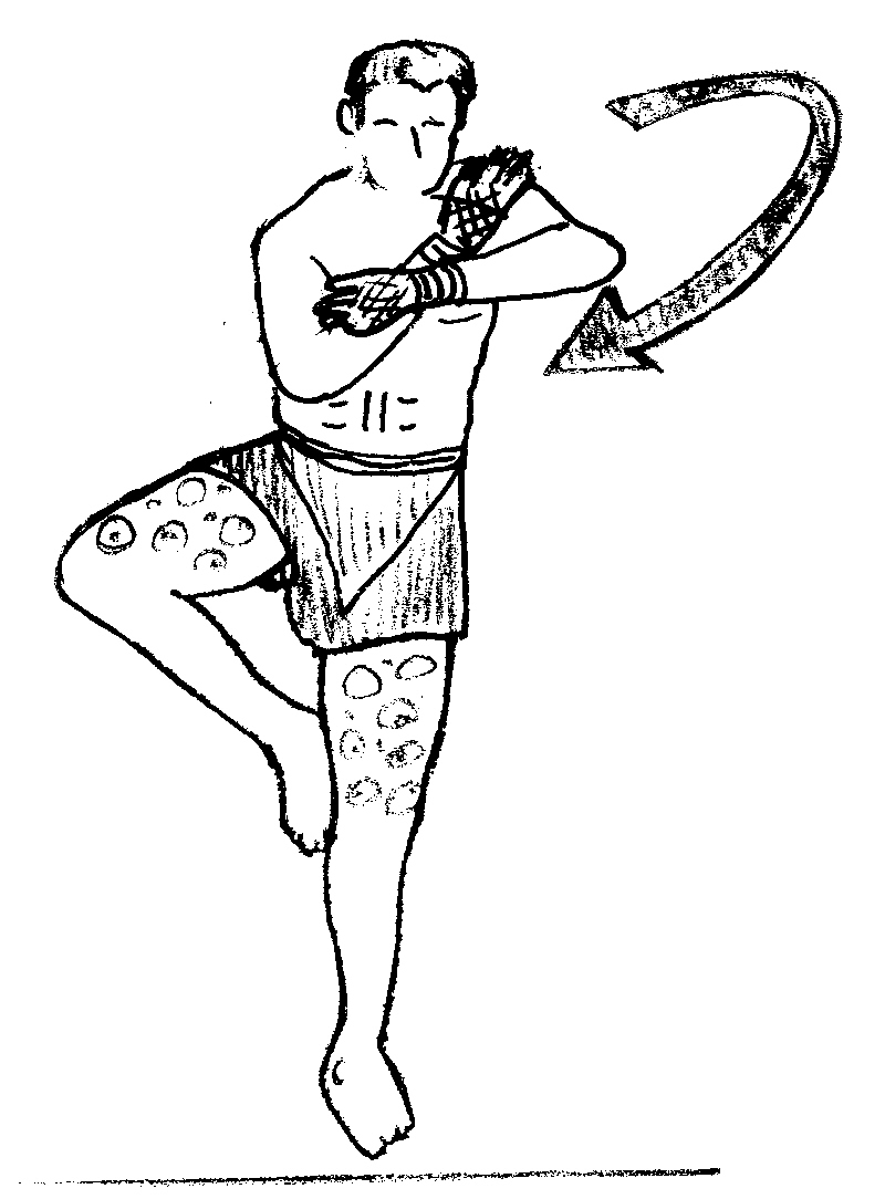 provoc0.jpg